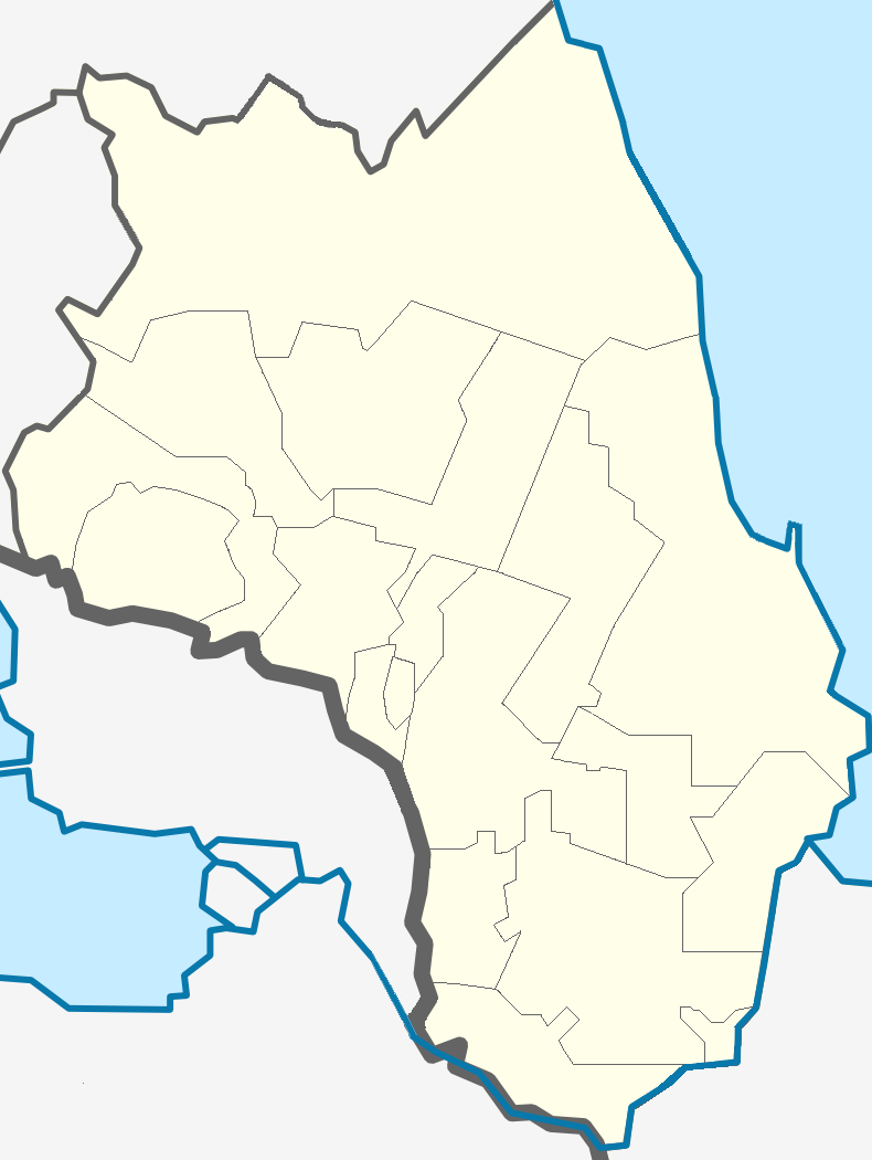 Карта Всеволожского района Ленинградской области с делением на муниципальные образования.